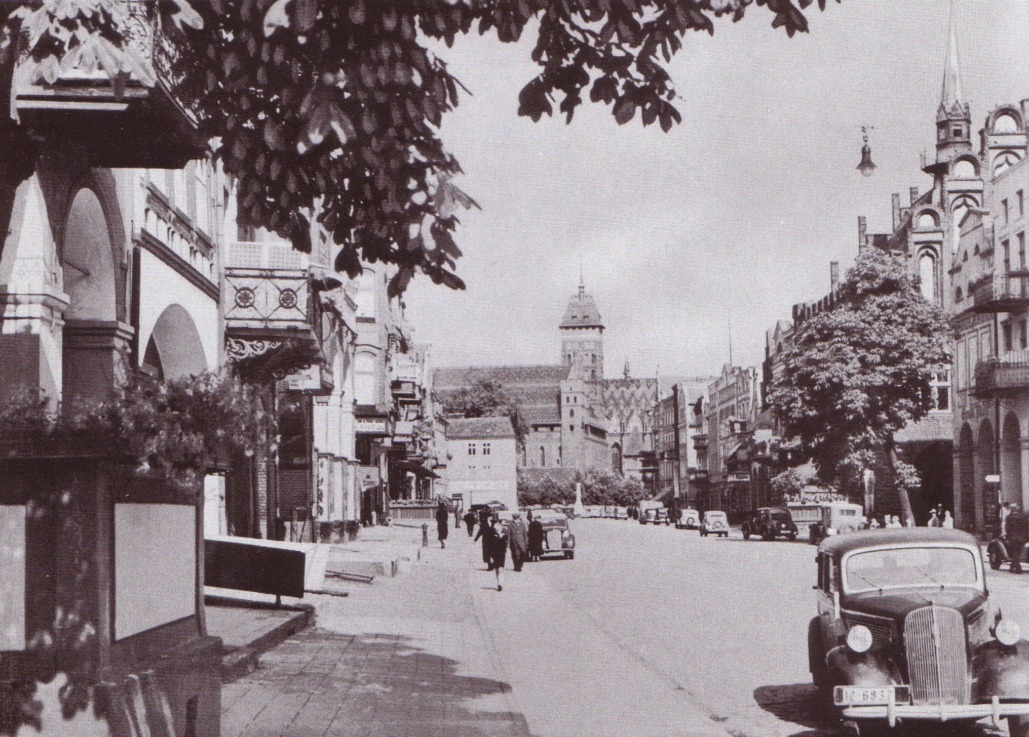 Die Stadtmitte von Marienburg in Westpreußen